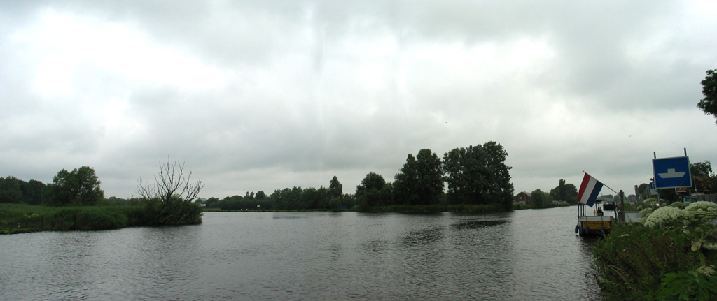 Het begin van het Spaarne.